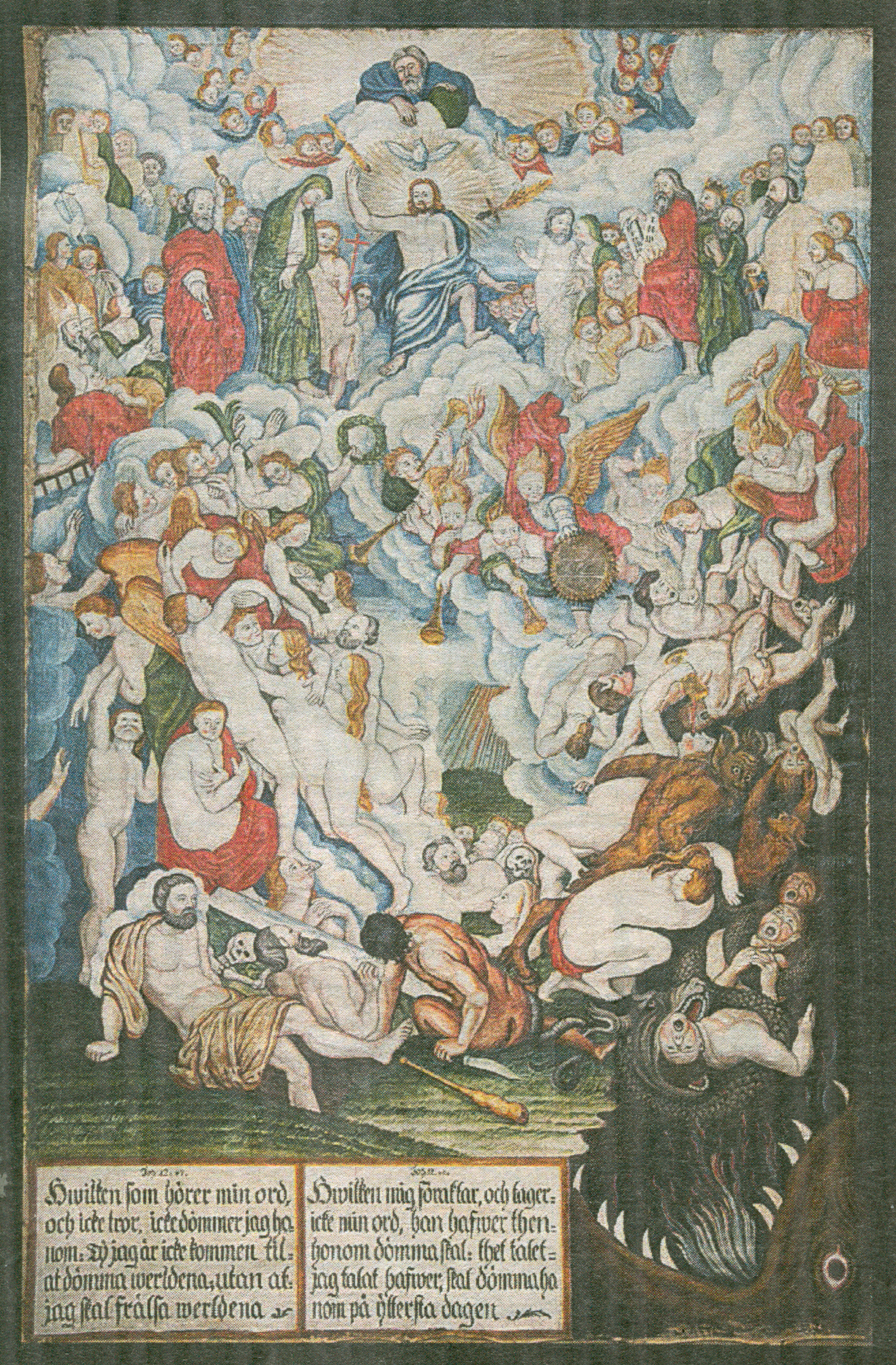 Dekorationsmålaren Johan Alm målade "Yttersta domen" för Kvevlax kyrka 1766. Det hände att folk svimmade när de såg "ilaktavlon" (elaktavlan). Sedan 1930 hänger den på Österbottens museum i Vasa.